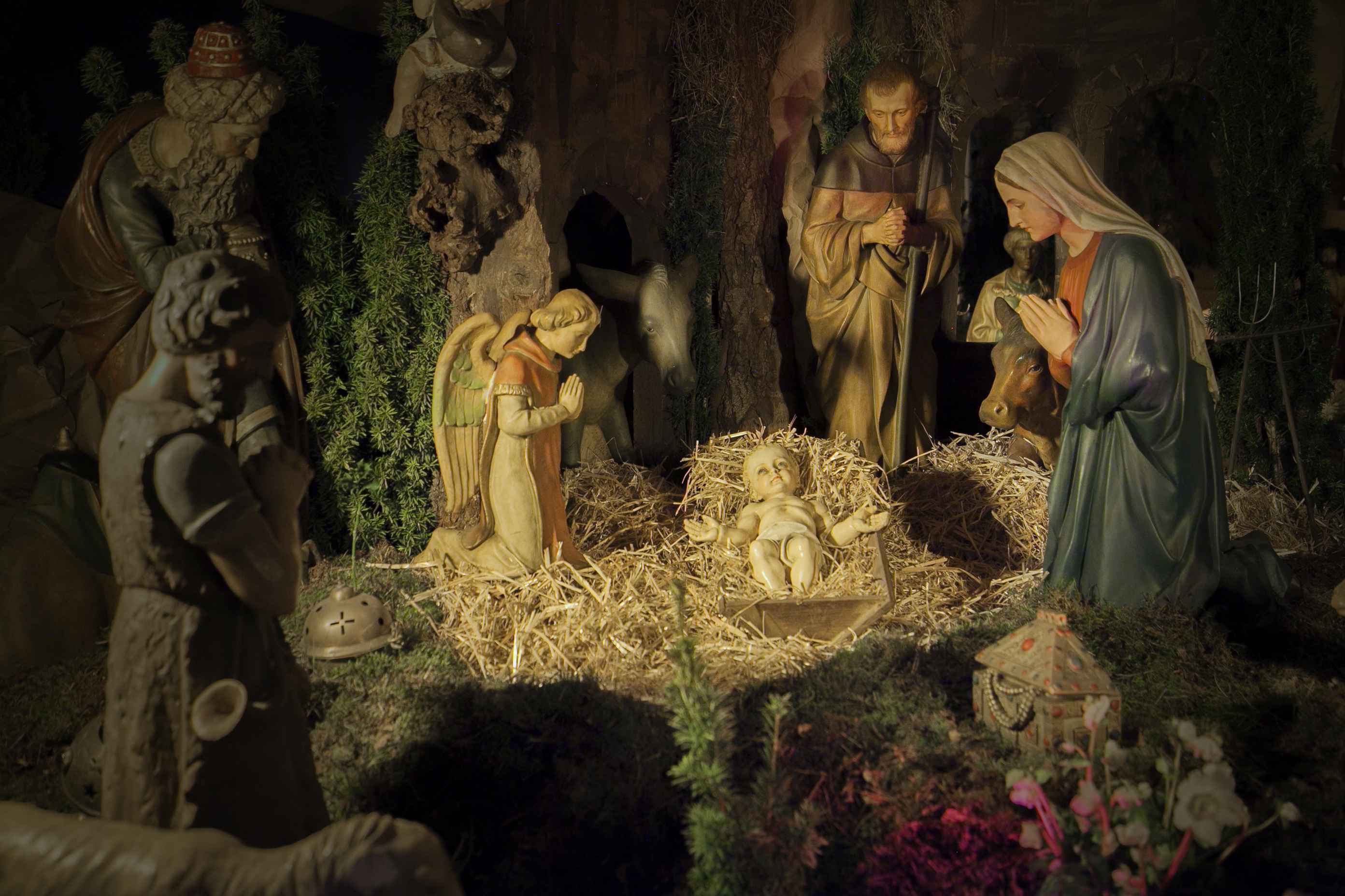 St. Antonius, Rheine, Hl. Familie